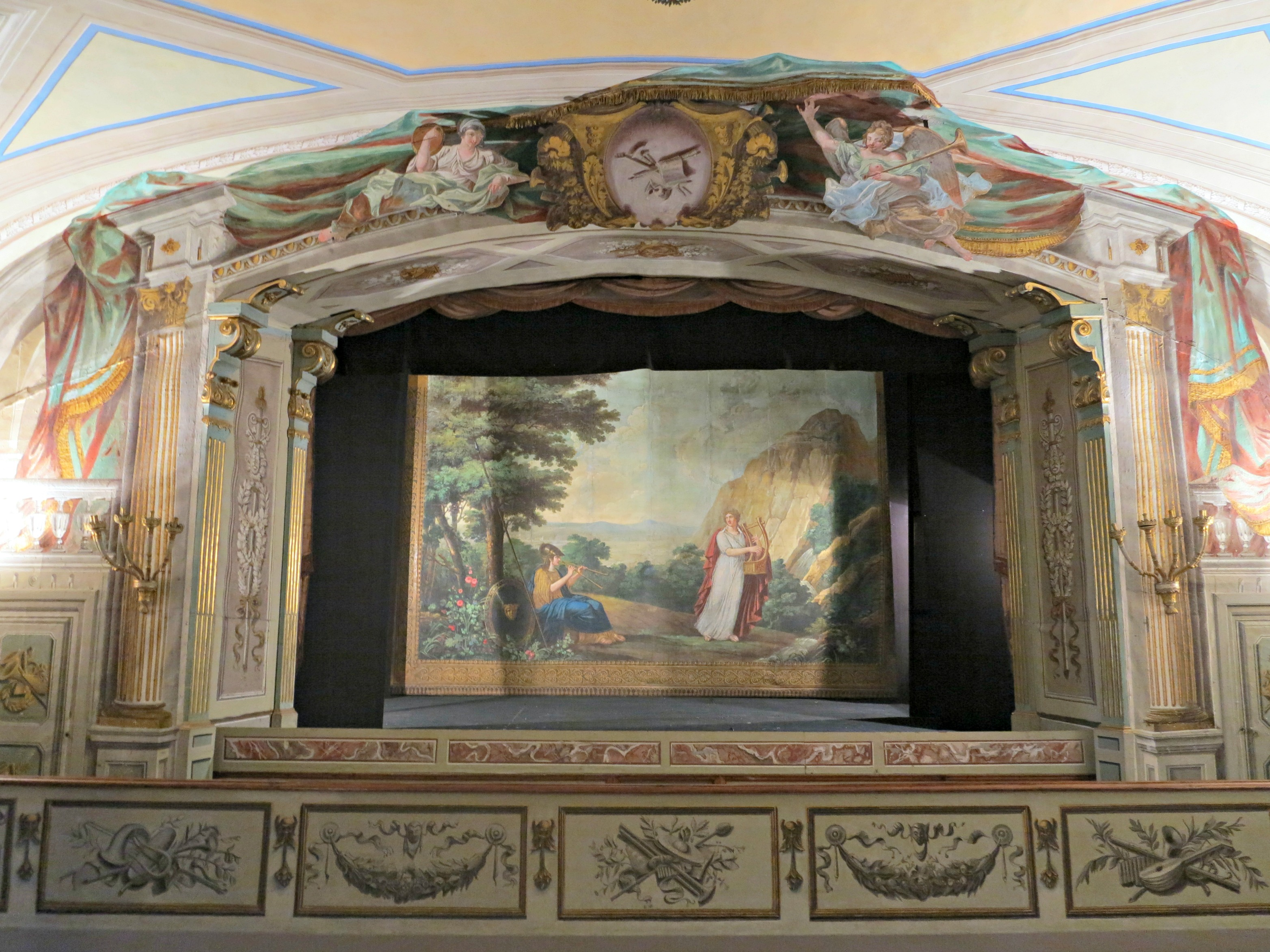 Villa medicea di Poggio a Caiano - MIBAC This is a photo of a monument which is part of cultural heritage of Italy.